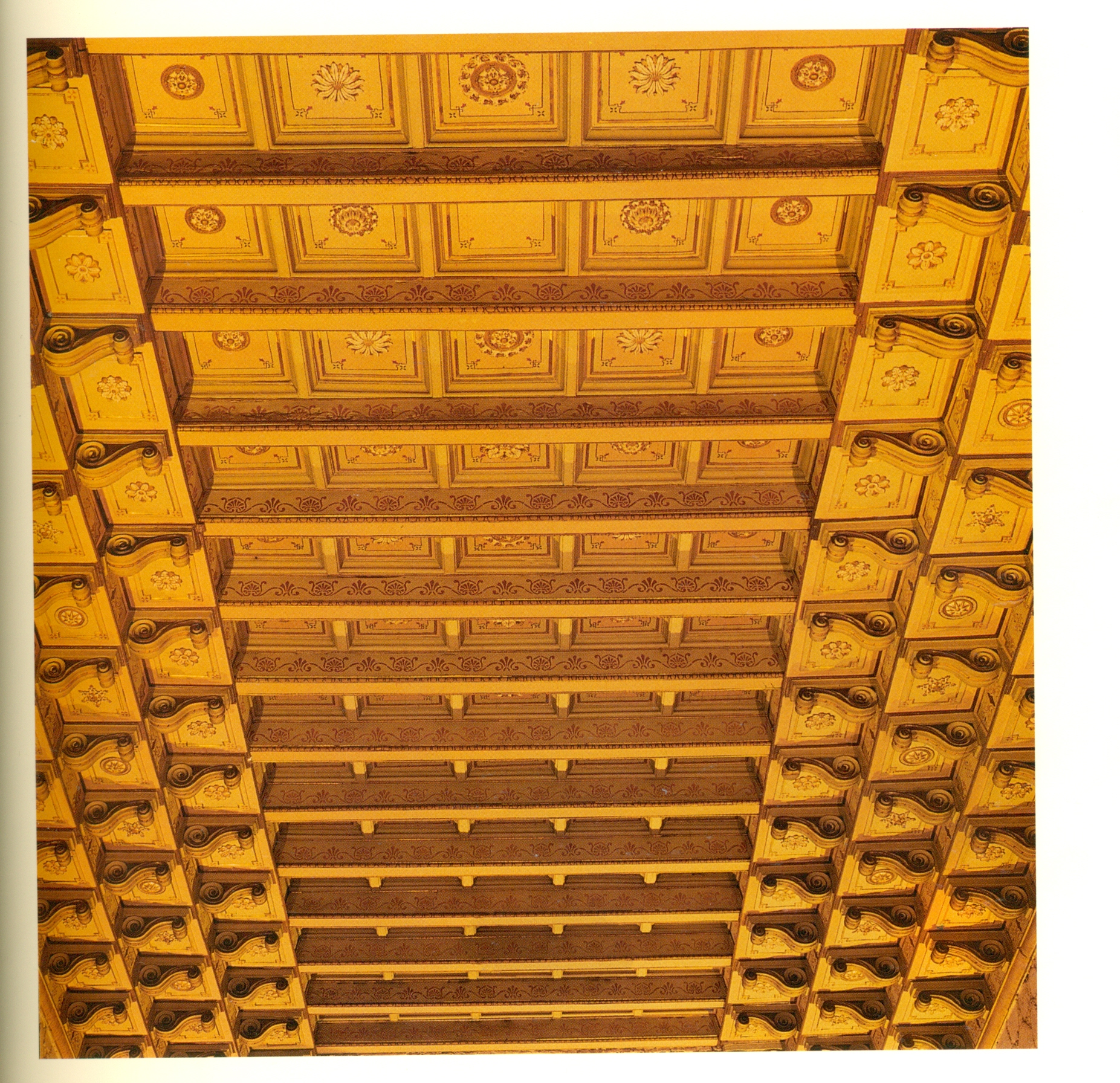 Detalle techo artesonado Iglesia Estilo mudejar